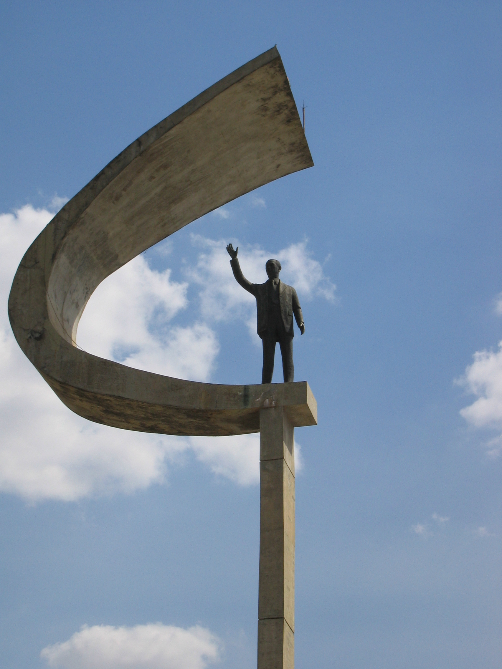 התמונה צולמה בידי, אורי רוזנהק.